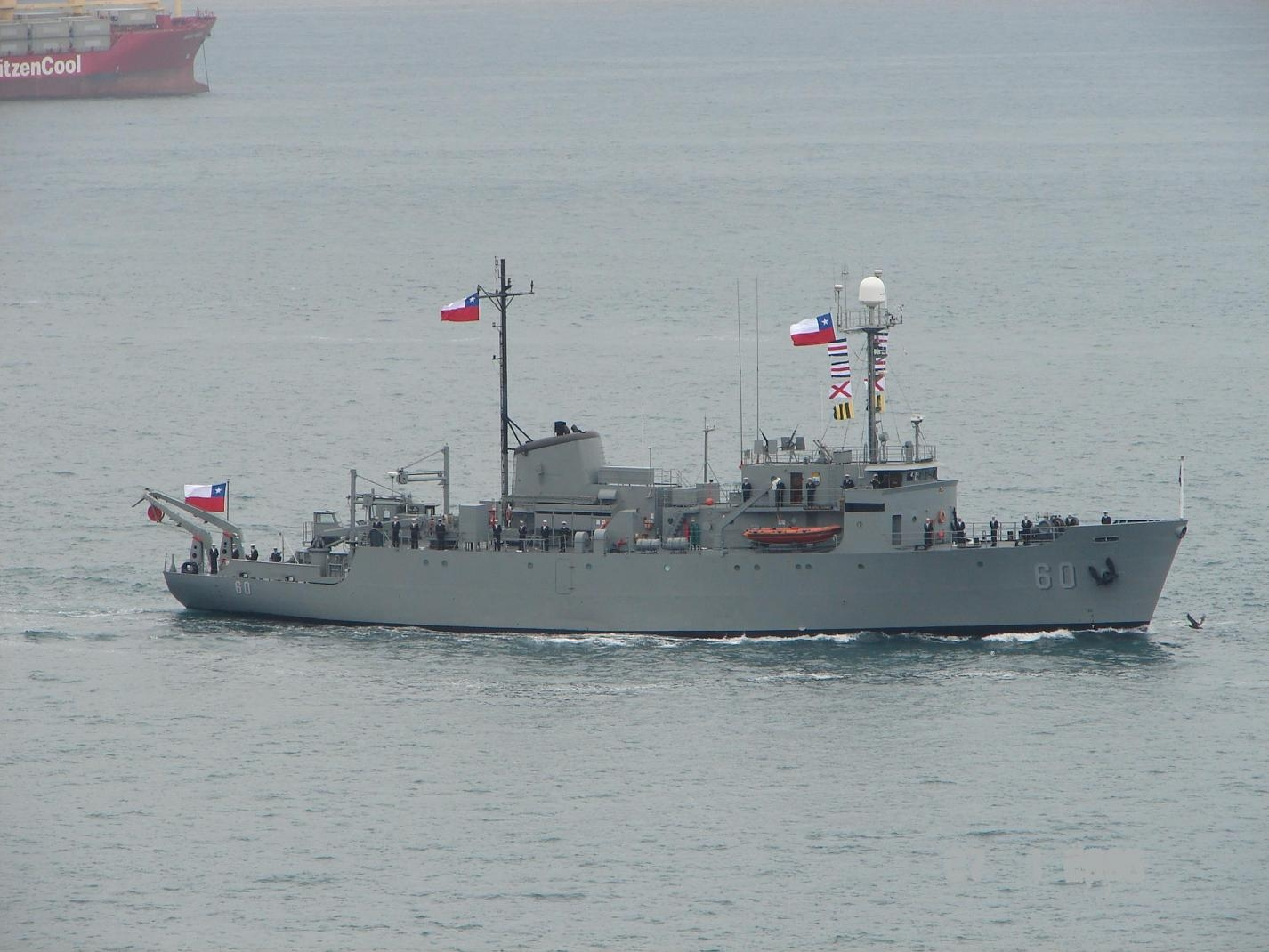 Buque Oceanografico Vidal Gormaz AGOR-60 ex USS Thomas Washington AGOR-10